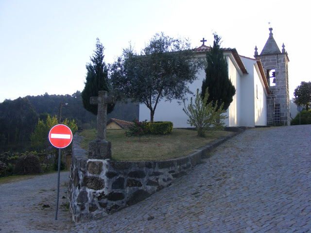 Amarante Igreja de Freixo de Cima Orago São Miguel trás